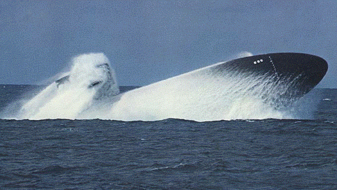 USS Birmingham führt zu Übungszwecken ein Notauftauchmanöver durch.